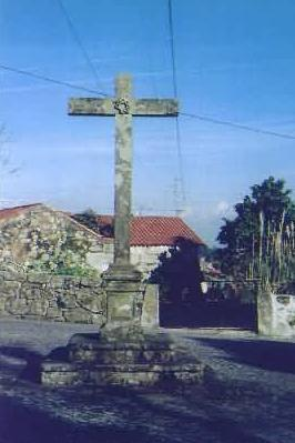 Cruzeiro do séc. XV